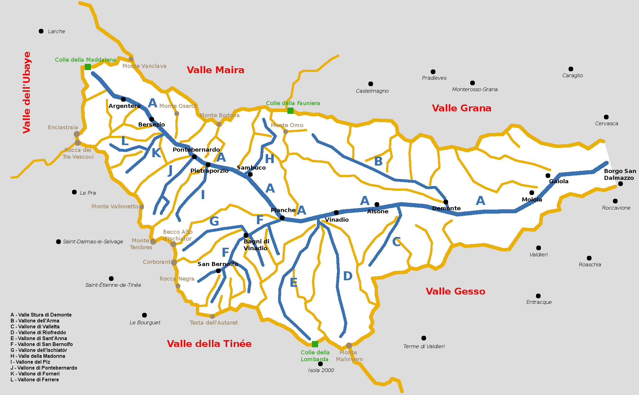 Schema generale della valle Stura di Demonte. In arancione, creste e spartiacque principali; in blu, linea di fondovalle e principali valli laterali.